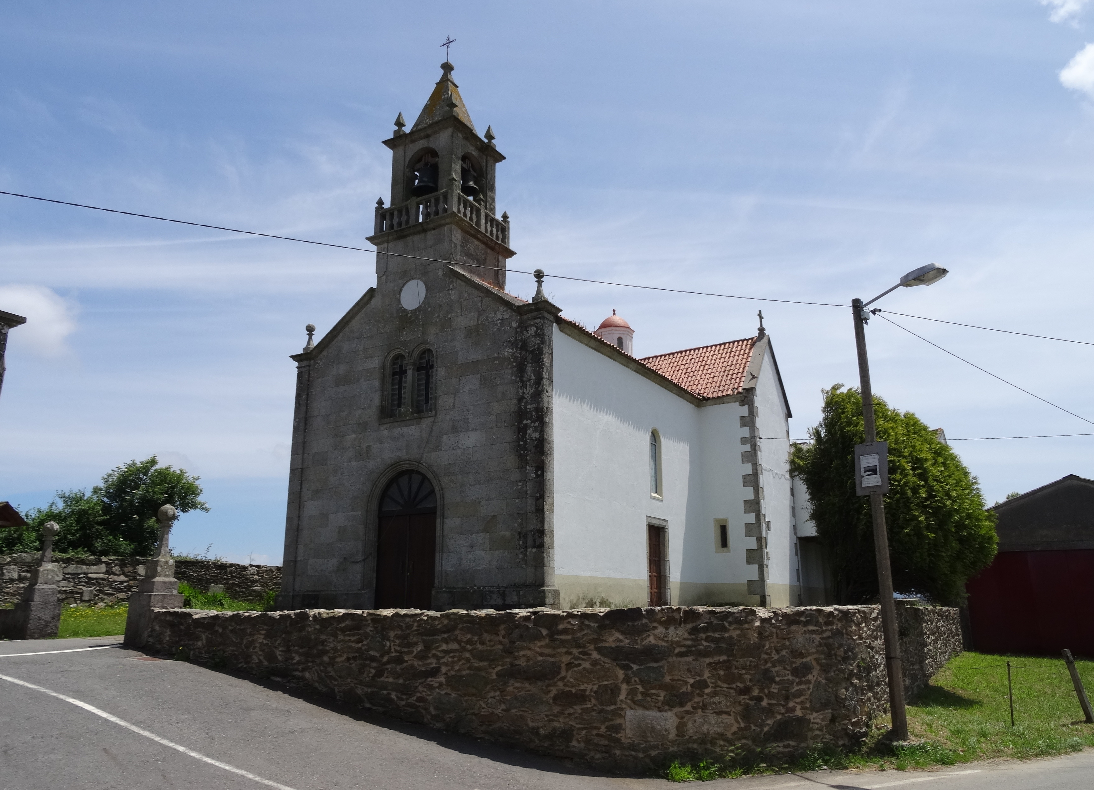 Igrexa de San Salvador de Pazos, Ponteceso.